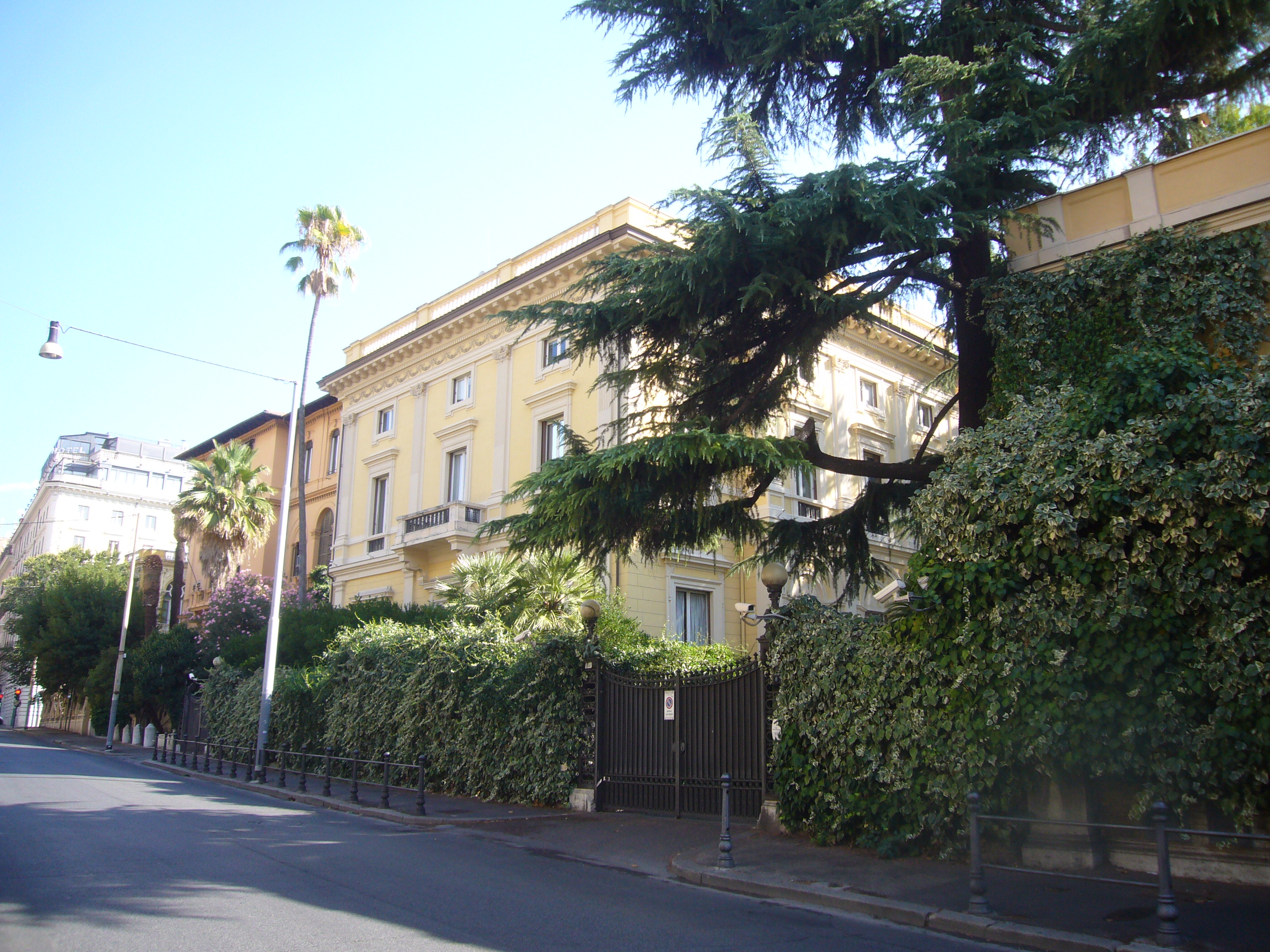 Roma, via Piemonte. Villino Casati.